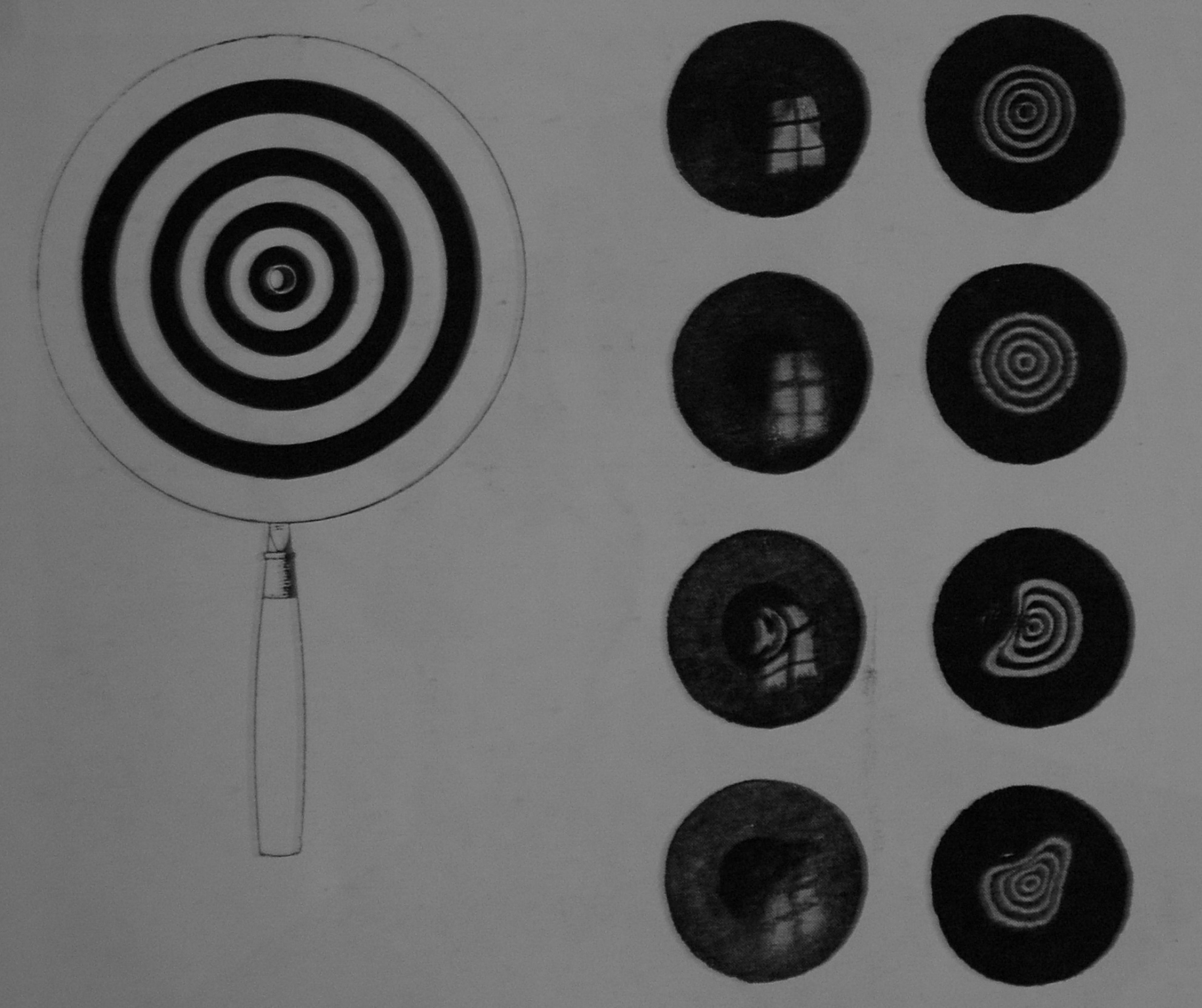 Reflexexempel från Placidos skiva från en mänsklig cornia, samt motsvarande reflexer från ett fönster